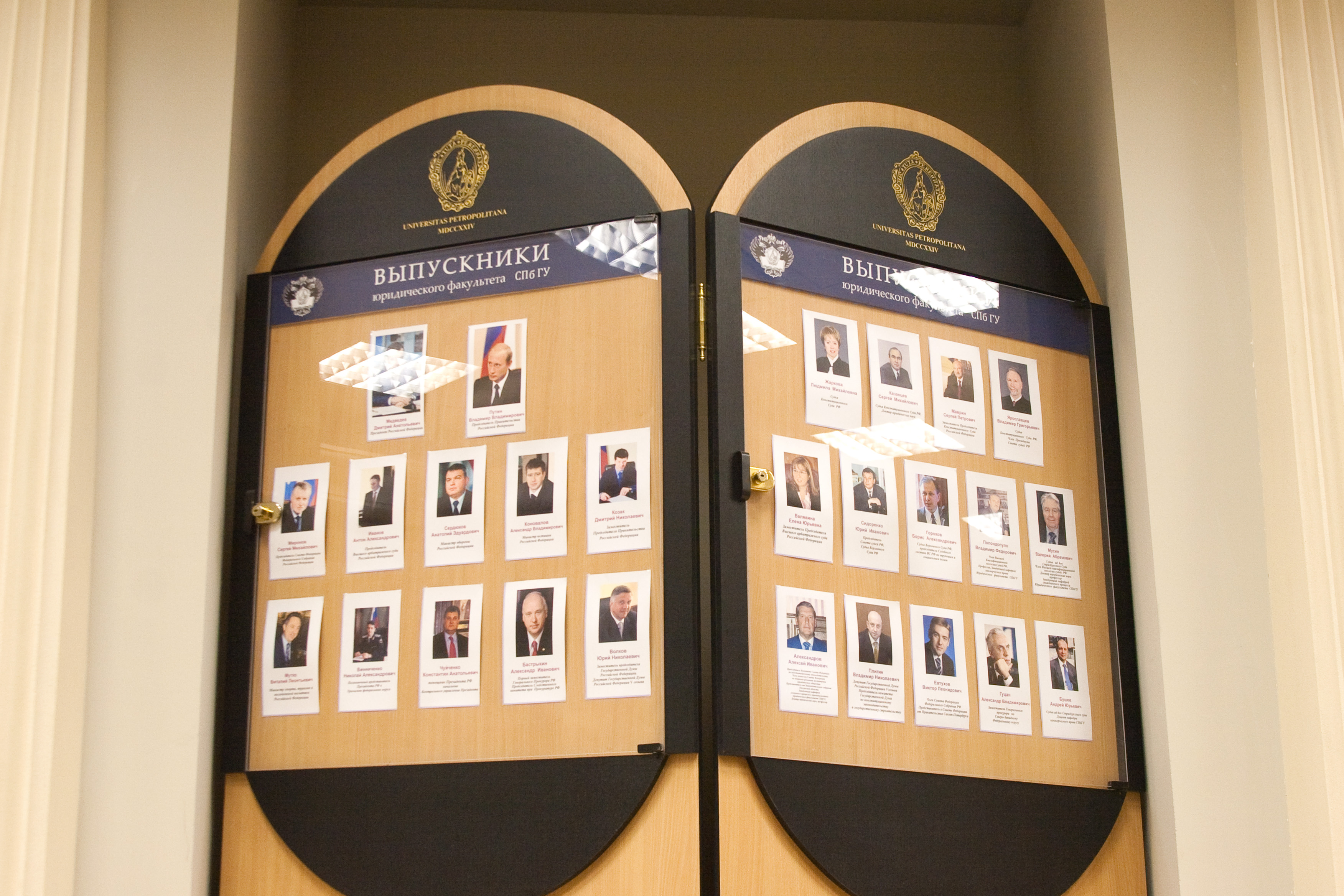 Стенд выпускников